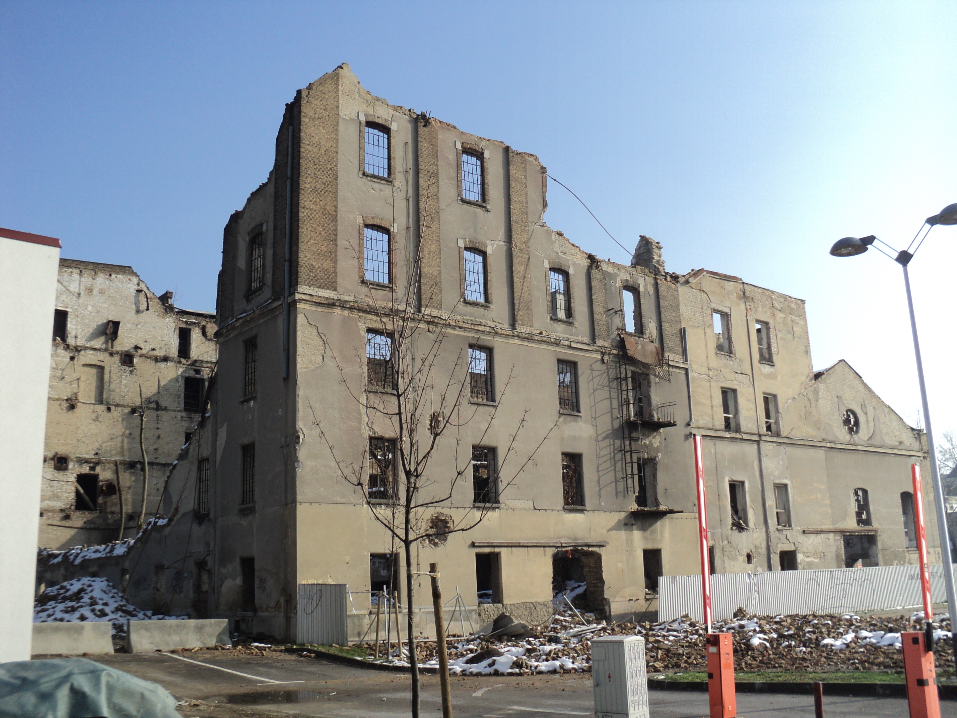 Zagrebački paromlin nakon urušavanja dijela zgrade od naleta jakog vjetra 11. studenog 2013. godine. Fotografija stanja na dan 6. veljače 2014. godine.